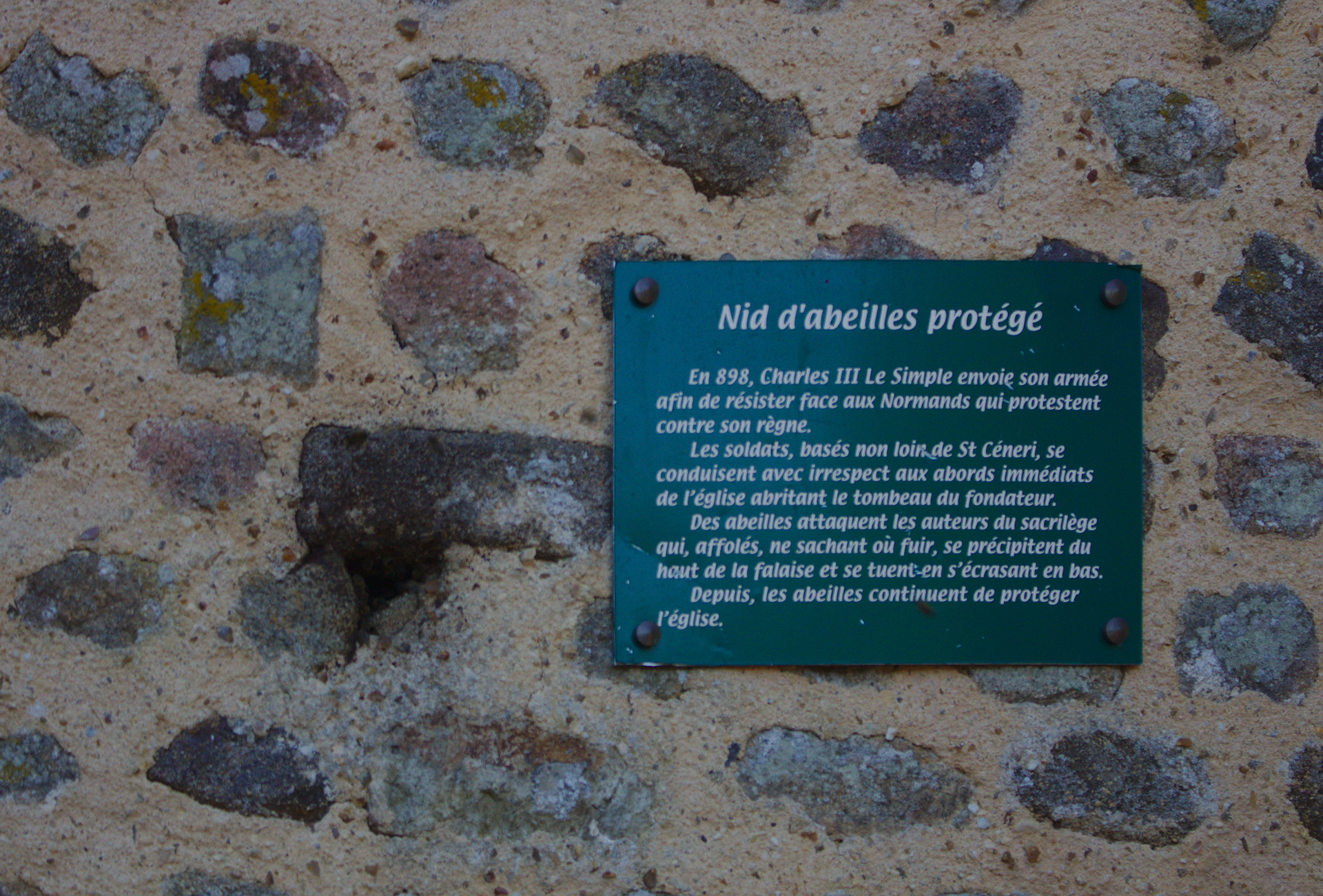 Nid d’abeille protégé situé dans l’un des murs de l’église de Saint céneri de Saint-Céneri-le-Gérei.